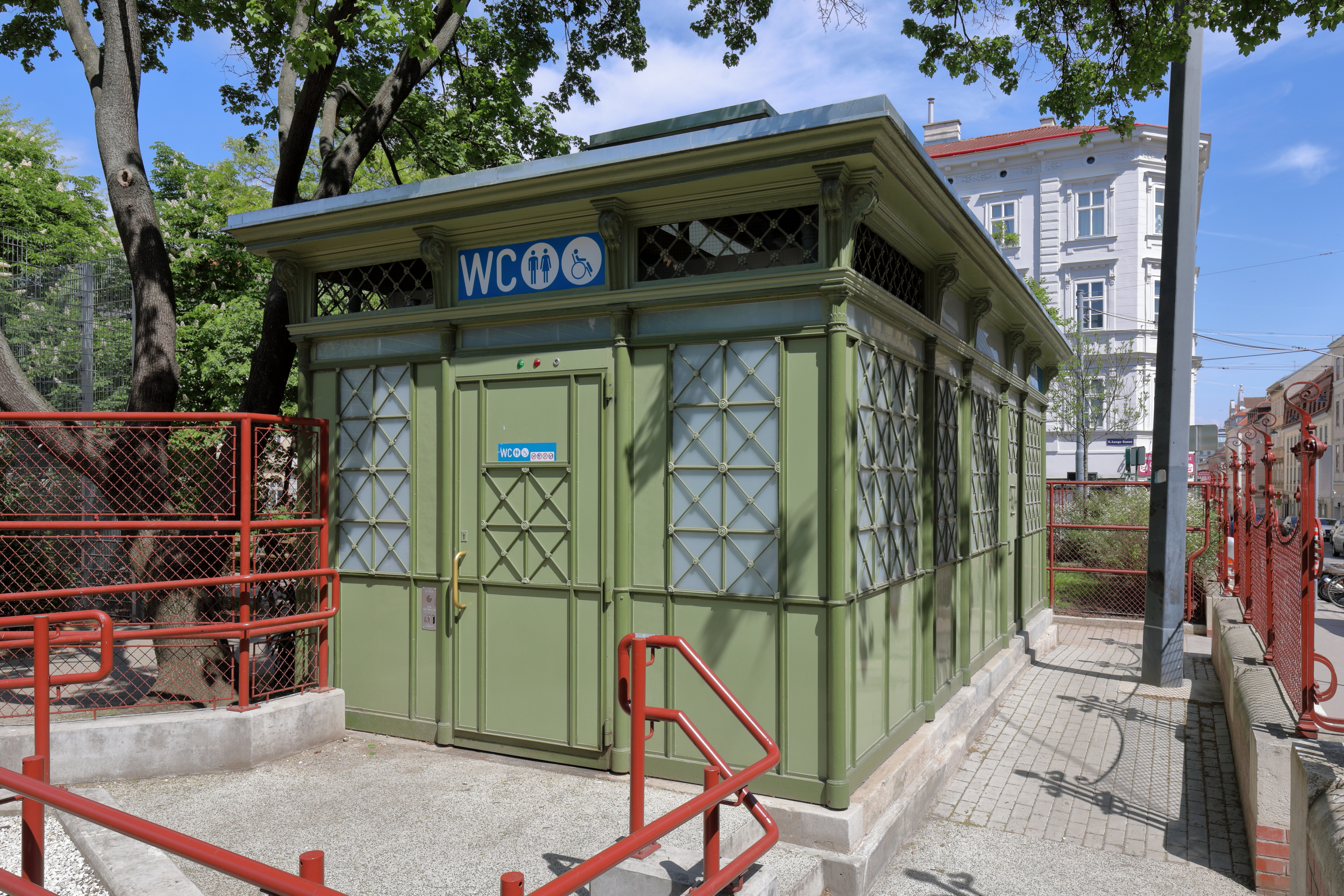 Die öffentliche WC-Anlage im Schönbornpark bzw. in der Florianigasse im 8. Wiener Gemeindebezirk Josefstadt. Die Errichtung der unter Denkmalschutz stehende Toilettenanlage erfolgte 1903 durch den Bauunternehmer Wilhelm Beetz. Im Jahr 2015 wurde diese historische Wiener Bedürfnisanlagen um 68.750 Euro komplett saniert und barrierefrei gestaltet.